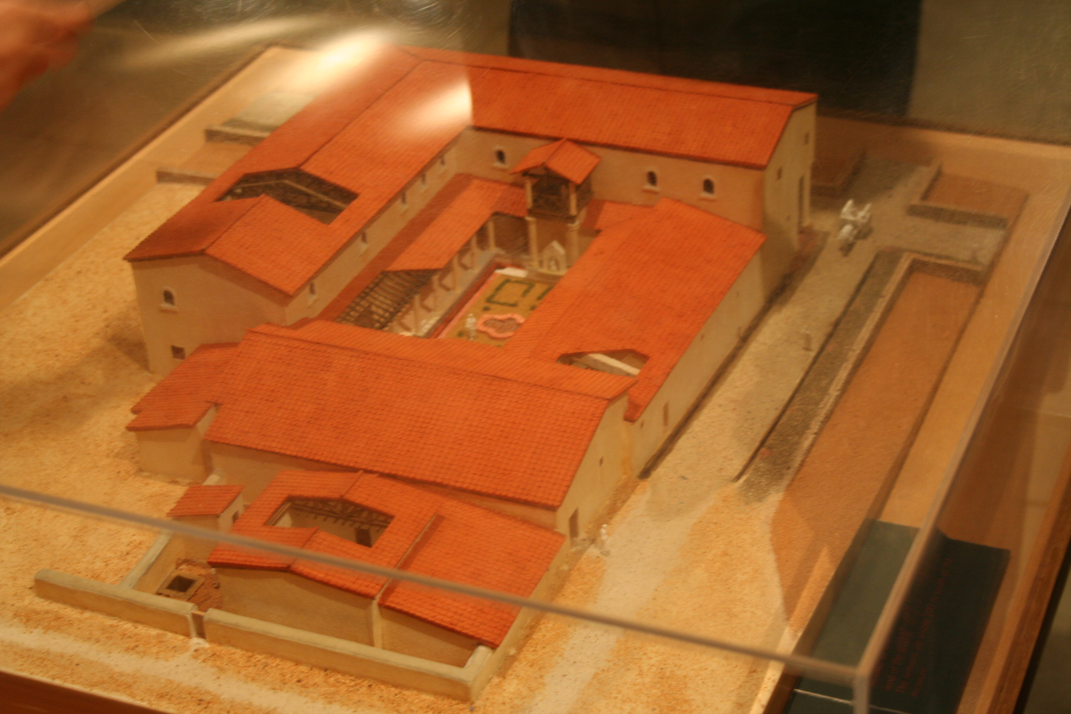 maquette de la villa au grand péristyle; Vieux la Romaine